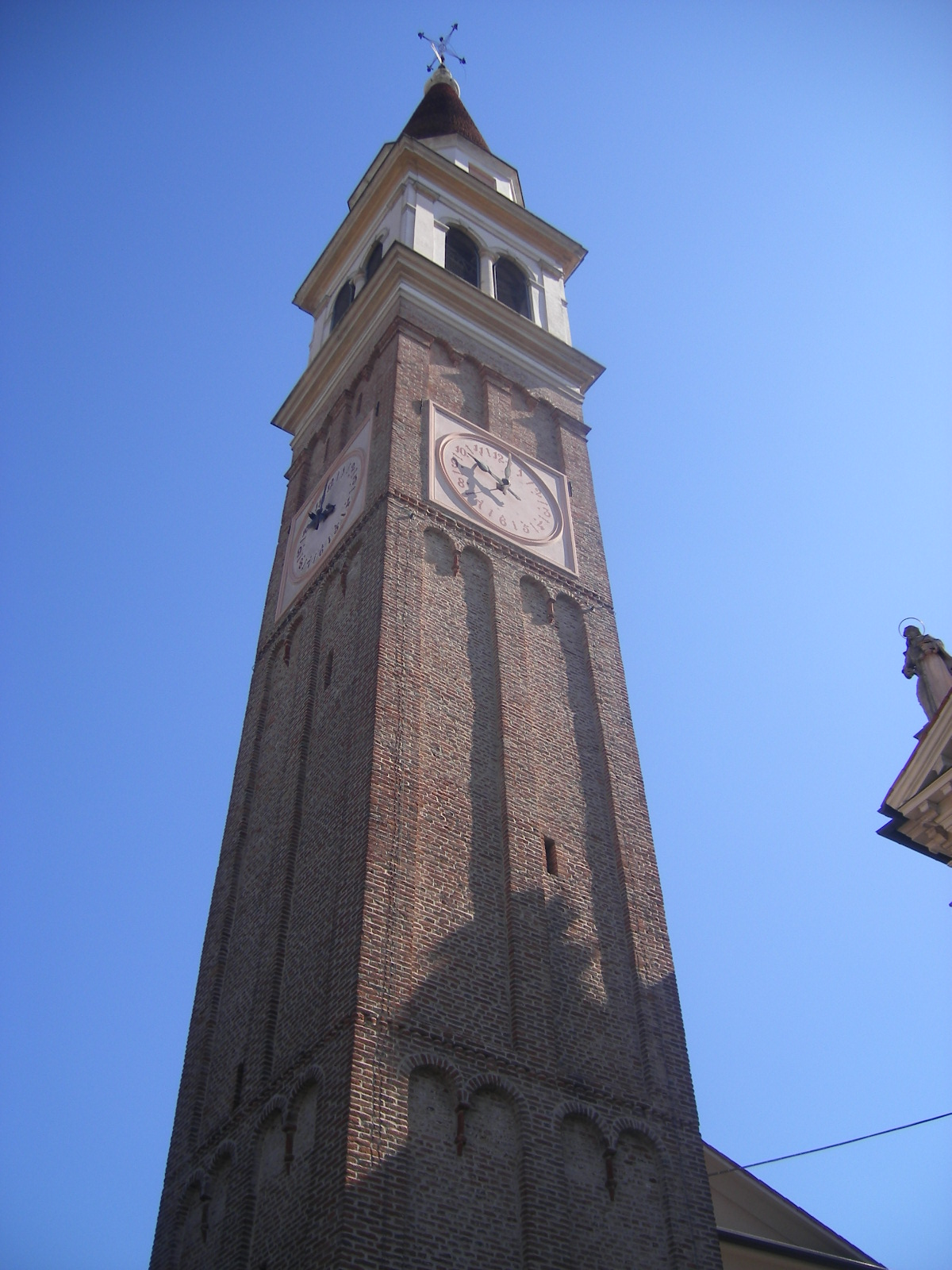 Scorze